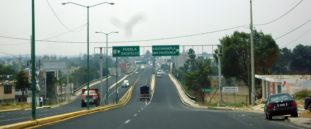 Blvd. Metropolitano Puebla-Tlaxcala (30kms)